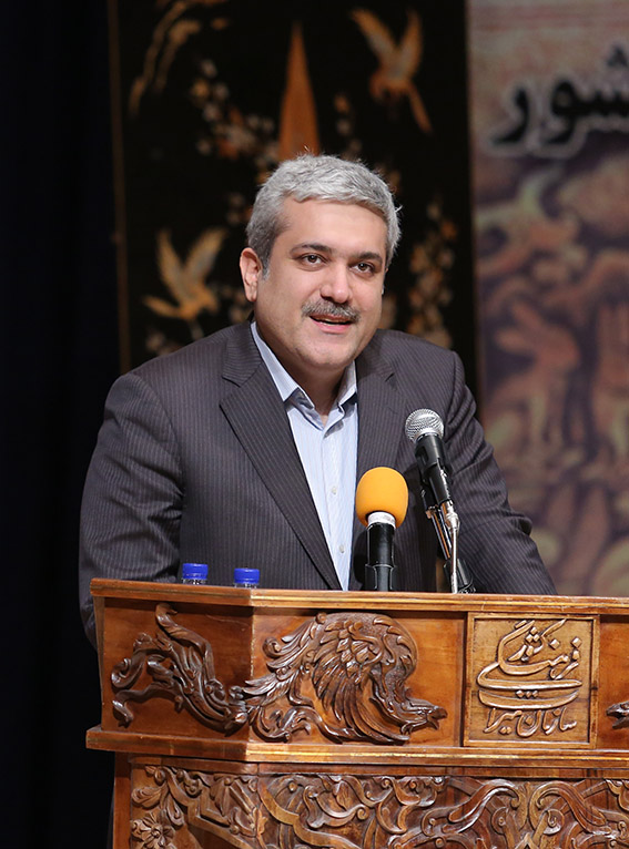 سورنا ستاری خواص معاون علمی و فناوری رئیس جمهوری